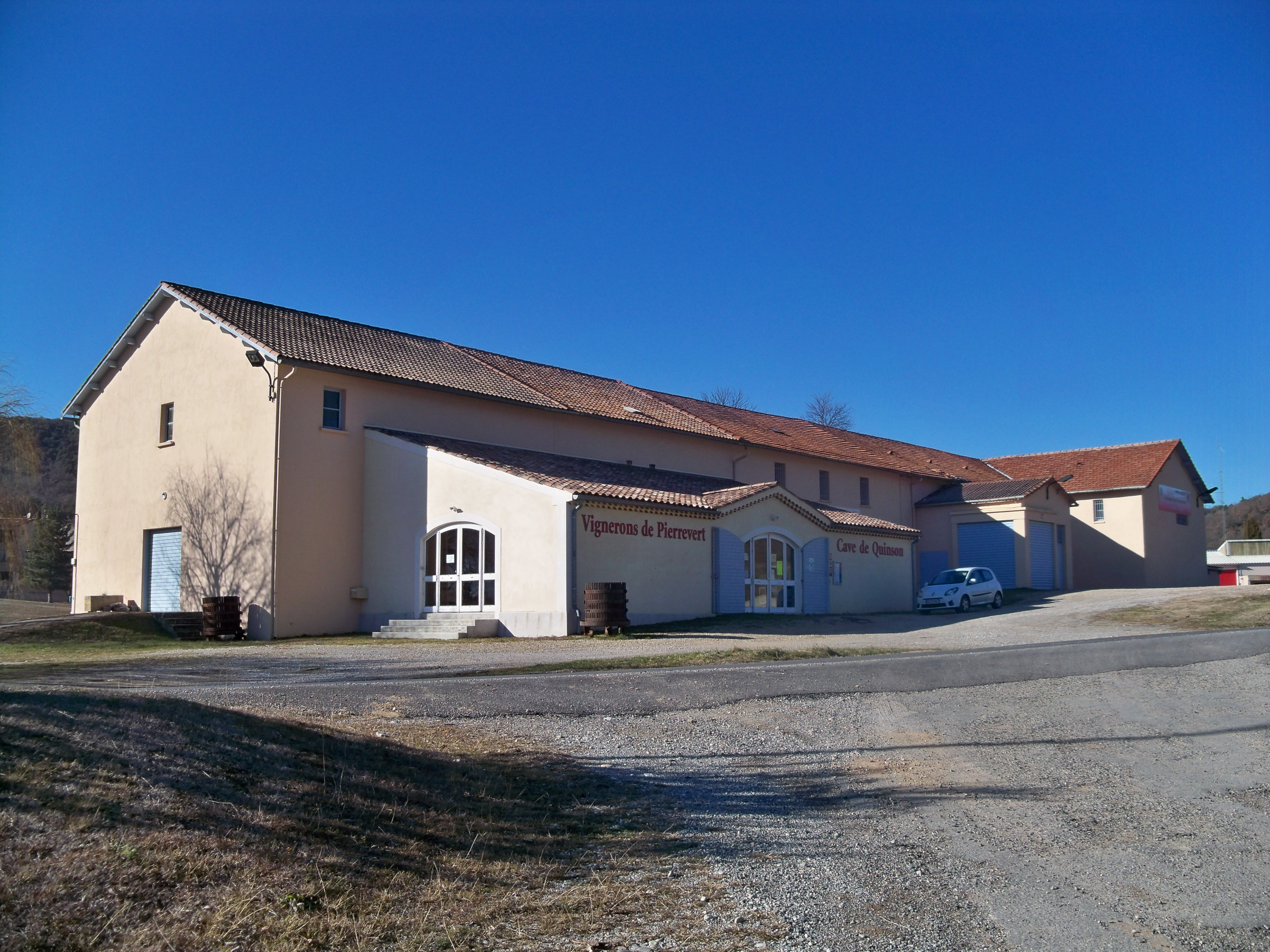 Cave coopérative viticole de Quinson (04), Pierrevert AOC